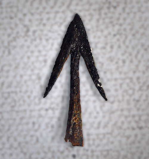 Наканечнік стралы з Мінскага замчышча (Музей гісторыі НАН Беларусі)